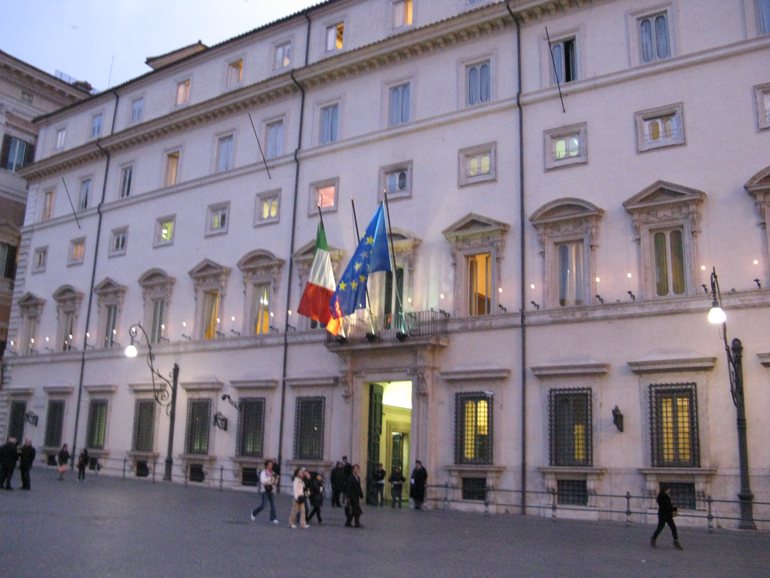 Facciata di Palazzo Chigi (Roma)